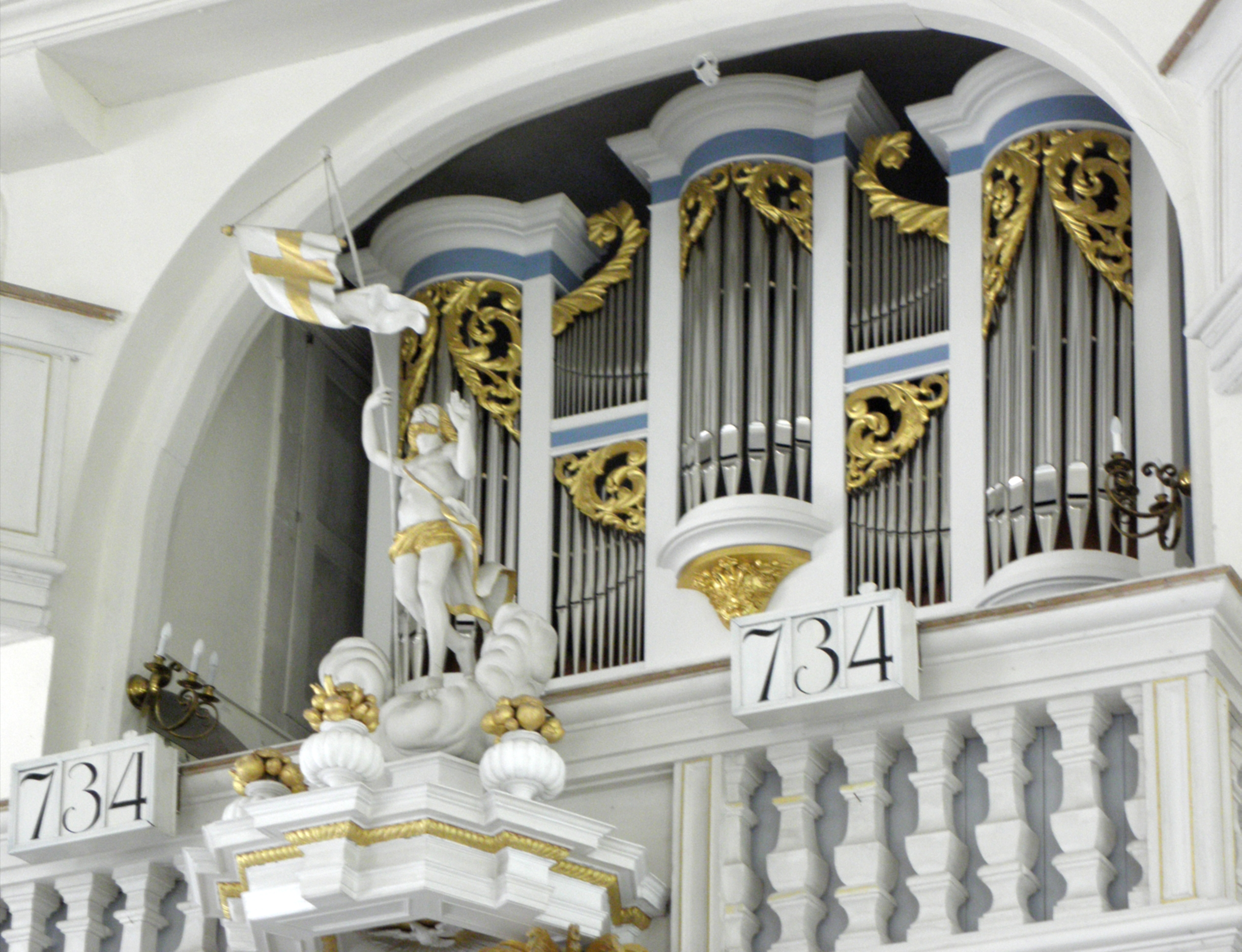 Carlsfeld, Trinitatiskirche, Innenansicht